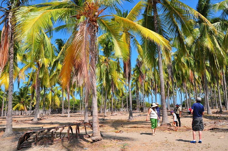 Isla Puna, Ecuador